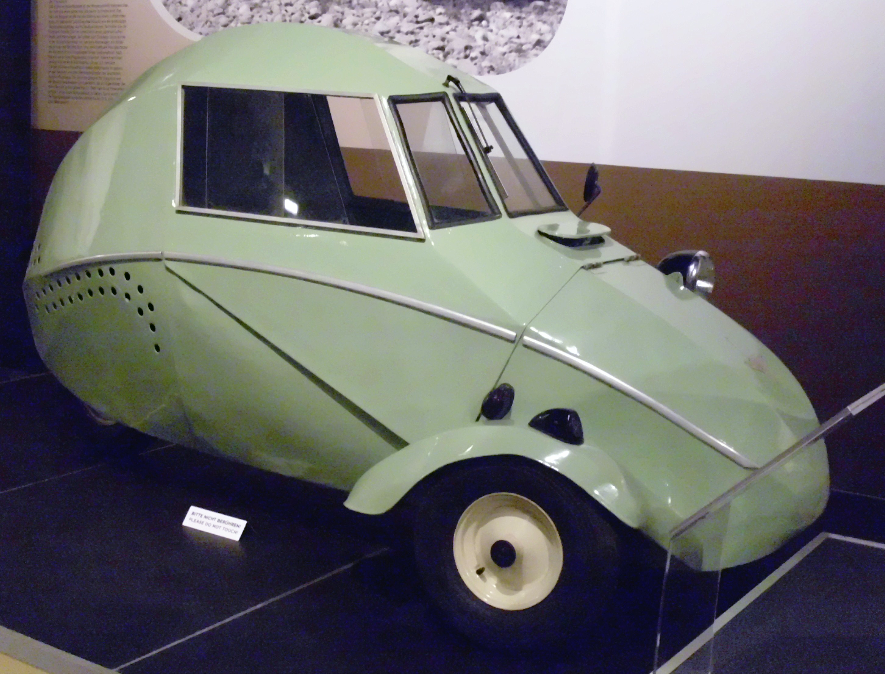 Fend Flitzer 101 1948-1951